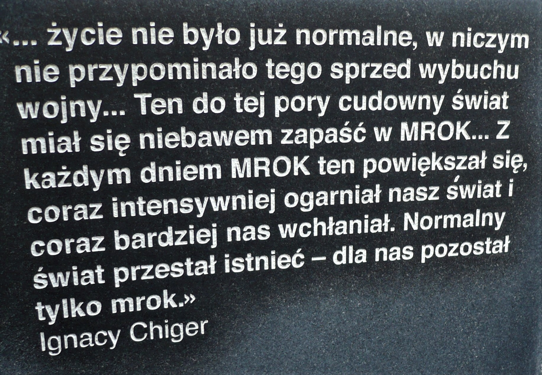 Synagoga Złota Róża we Lwowie. Pomnik